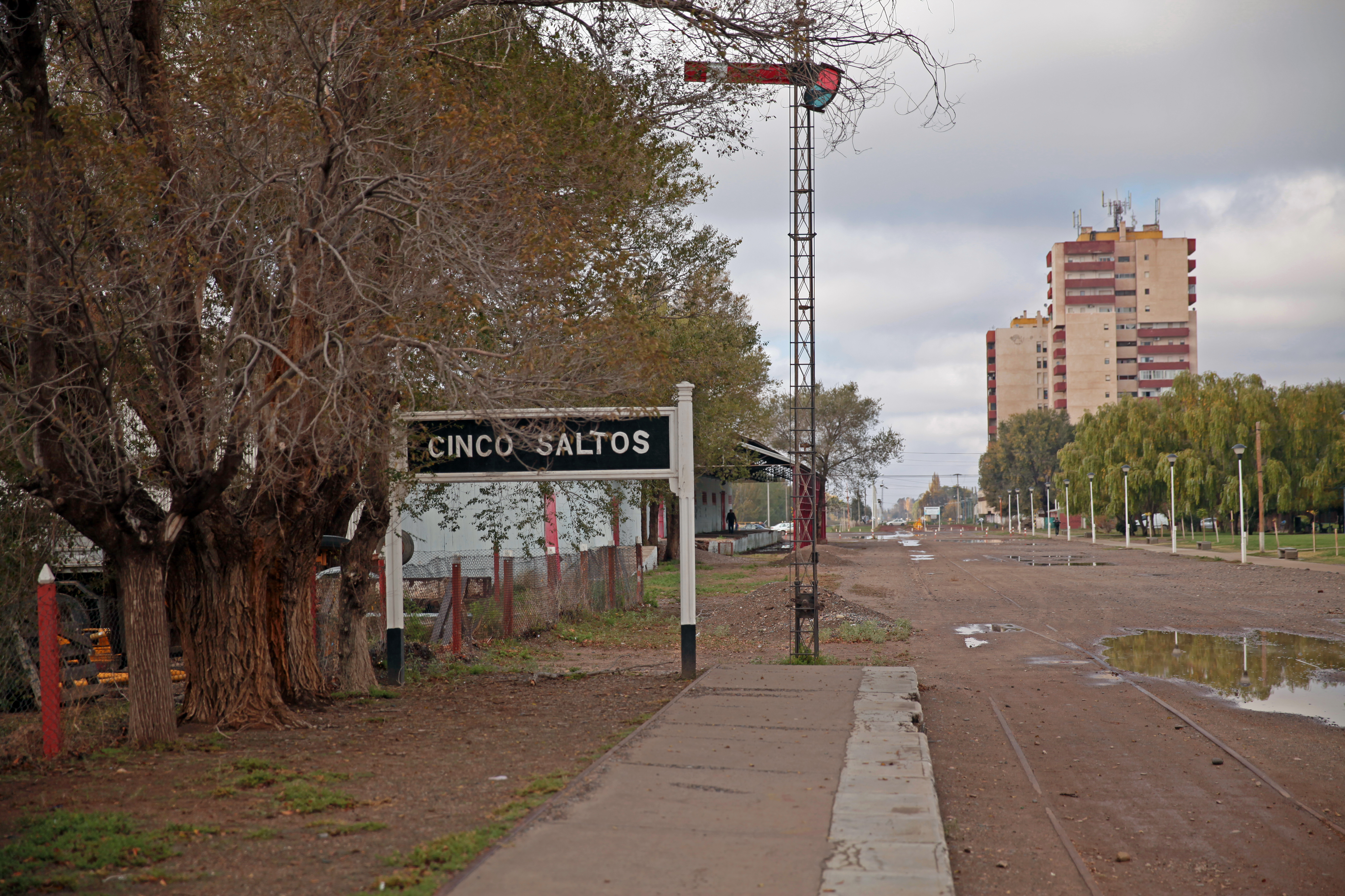 estacion tren - cinco saltos - nomenclador y señales